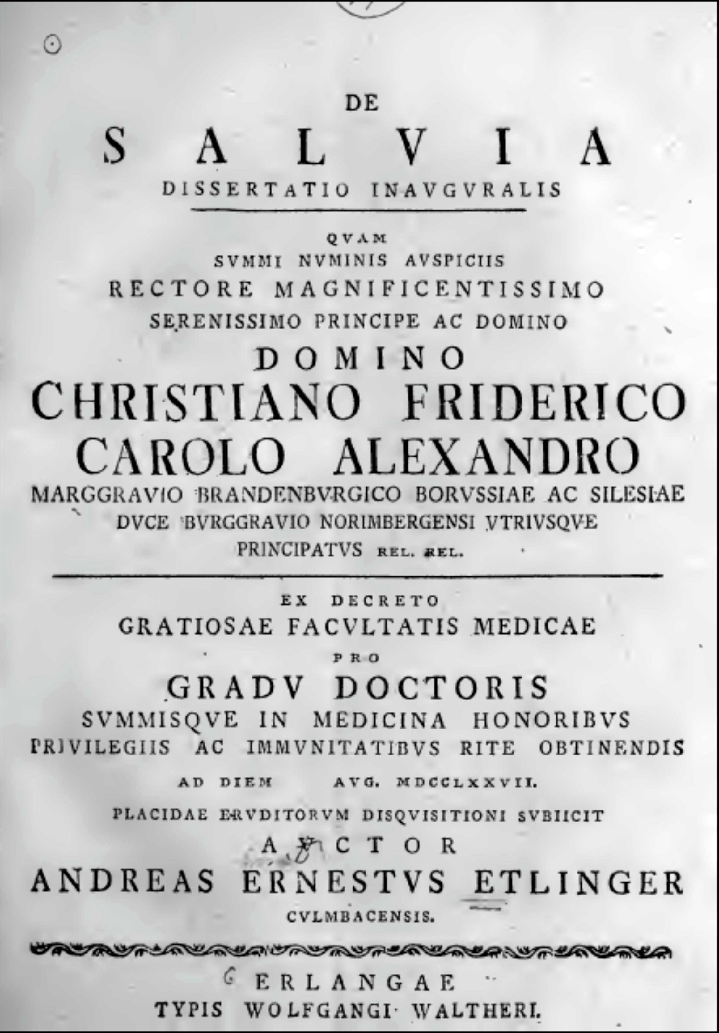 Titelseite Inauguraldissertation 1777